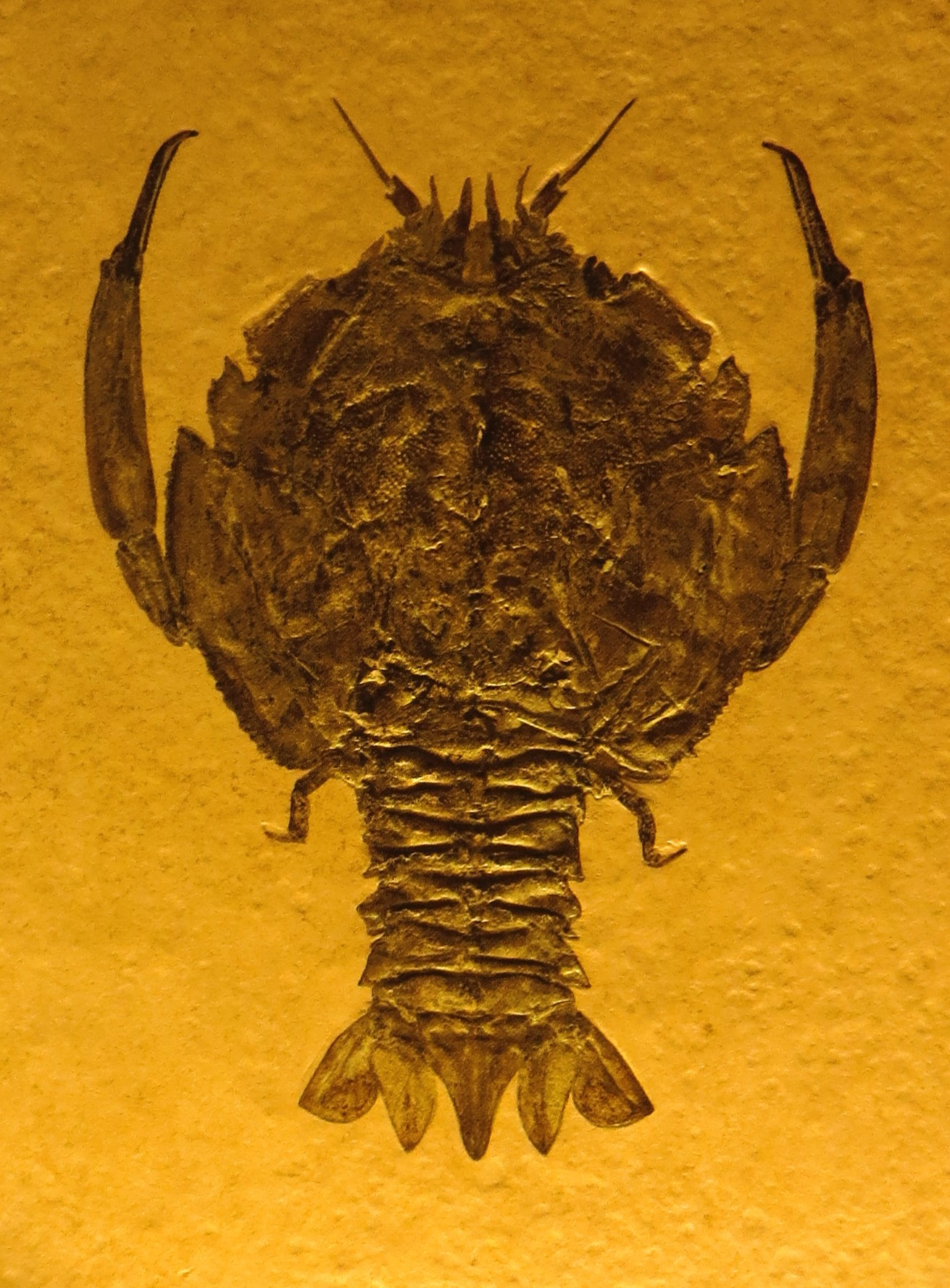 Fossil of Cycleryon, an extinct crustacean- Took the picture at Museo de la Naturaleza y el Hombre - Tenerife